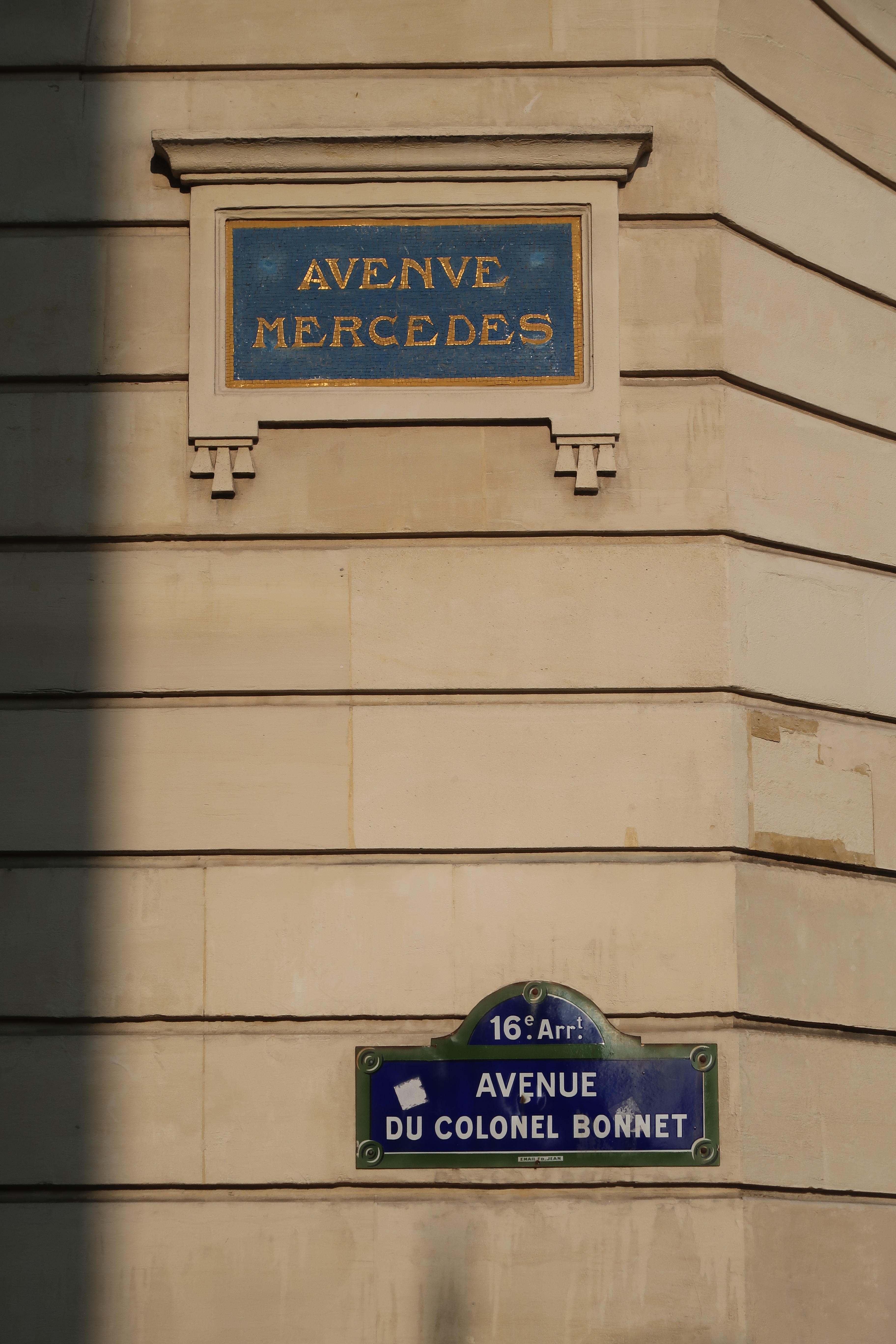 Plaques de l'avenue du Colonel-Bonnet et de l'ancienne avenue Mercedes (Paris, 16e).